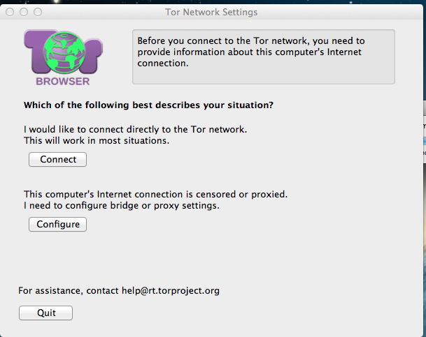 Tor-en instalazio pausuak